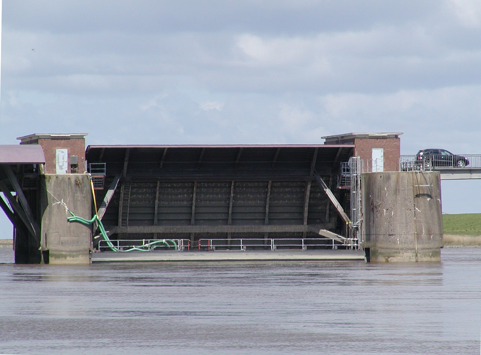 Eins der vier Tore ist zu Wartung geschlossen